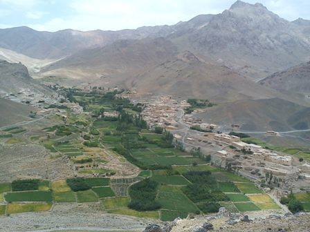 در ابتدای دره علودانی موقعیت دارد